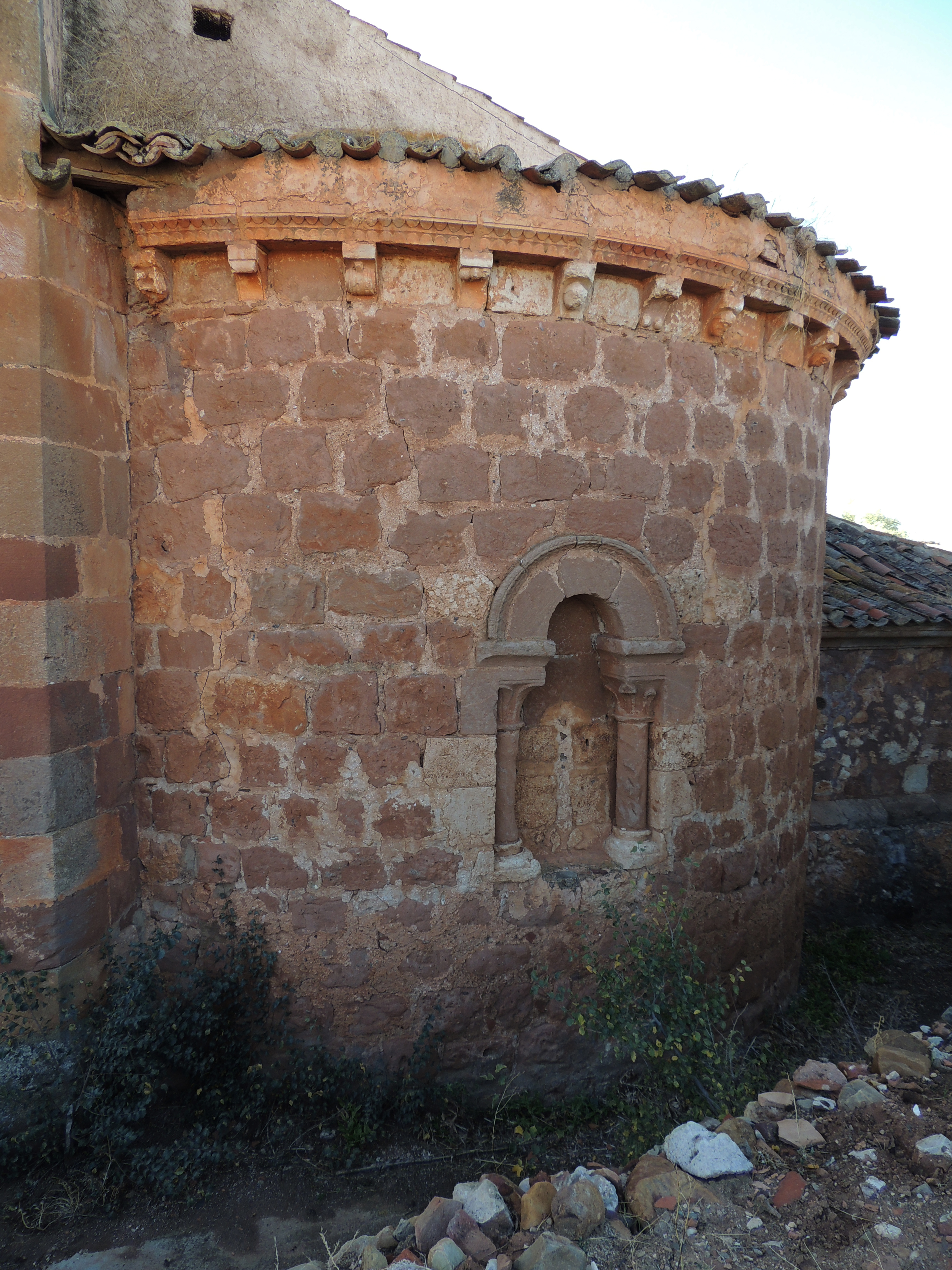 Francos - Iglesia de la Exaltación de la Santa Cruz